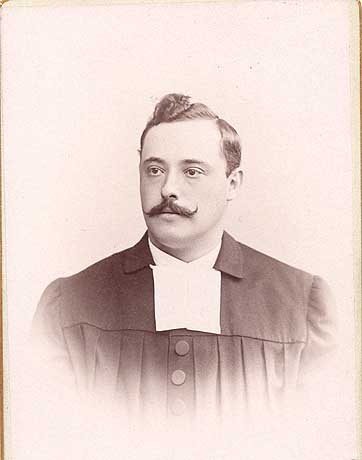 Portrait von Wilhelm Taurit